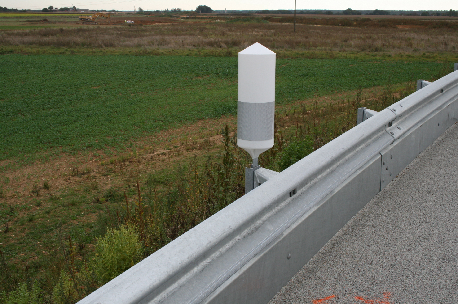 Balise de virage J1 posée sur barrière de sécurité métallique en France